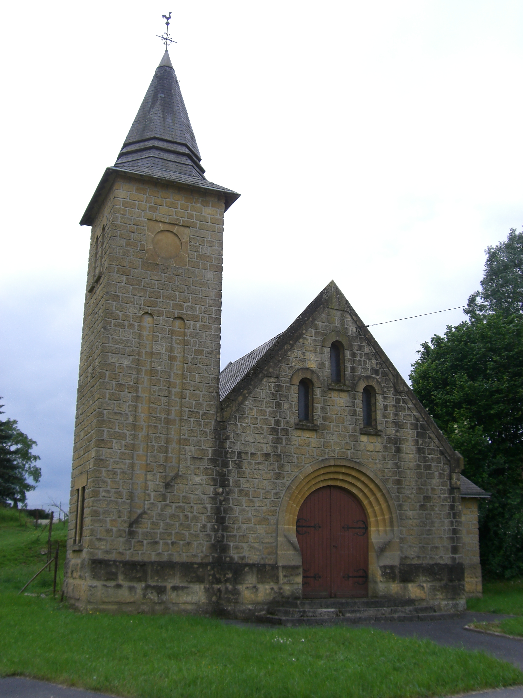 Chapelle de Saint-Georges (Landres-et-Saint-Georges, Ardennes, France)